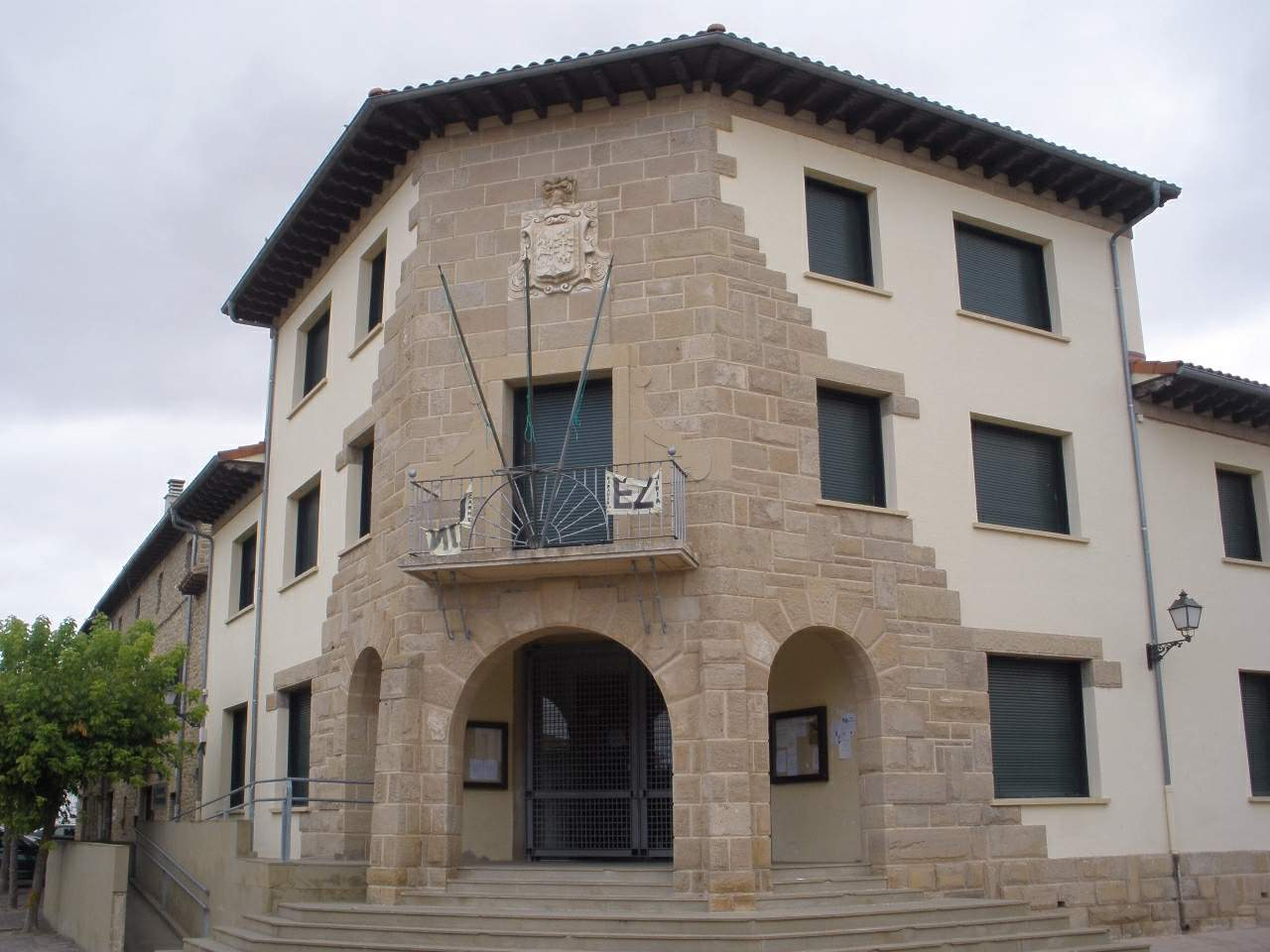 Ayuntamiento de Obanos (Navarra)